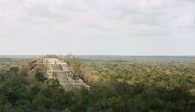 Vista a la selva y la estructura I del Calakmul (Campeche) Abril 2006